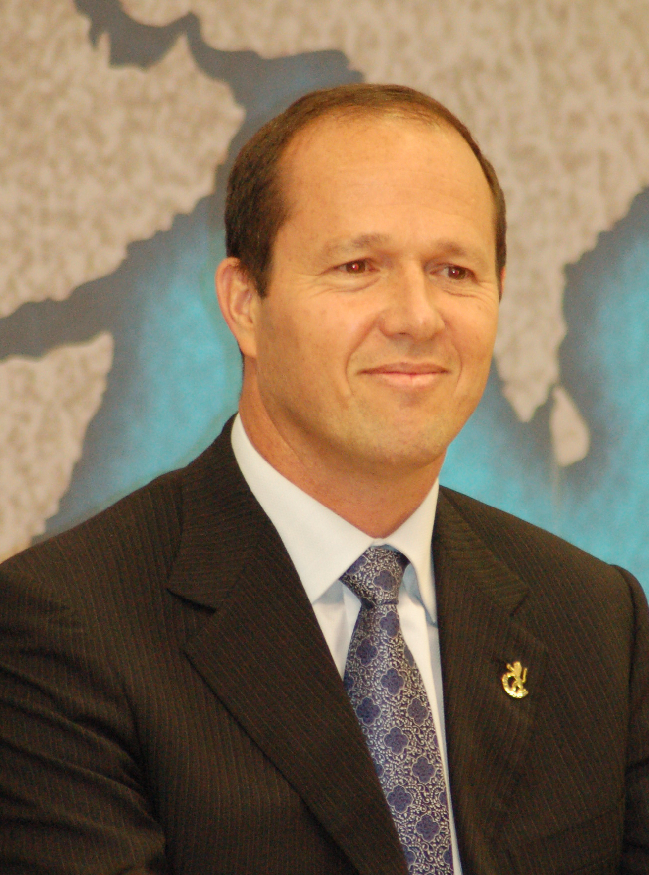 Nir Barkat, Mayor of Jerusalem